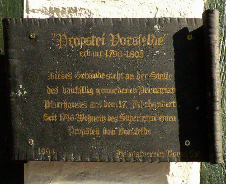 Schild des Heimatvereins an der Propstei Vorsfelde zur Gebäudegeschichte des Propsteigebäudes